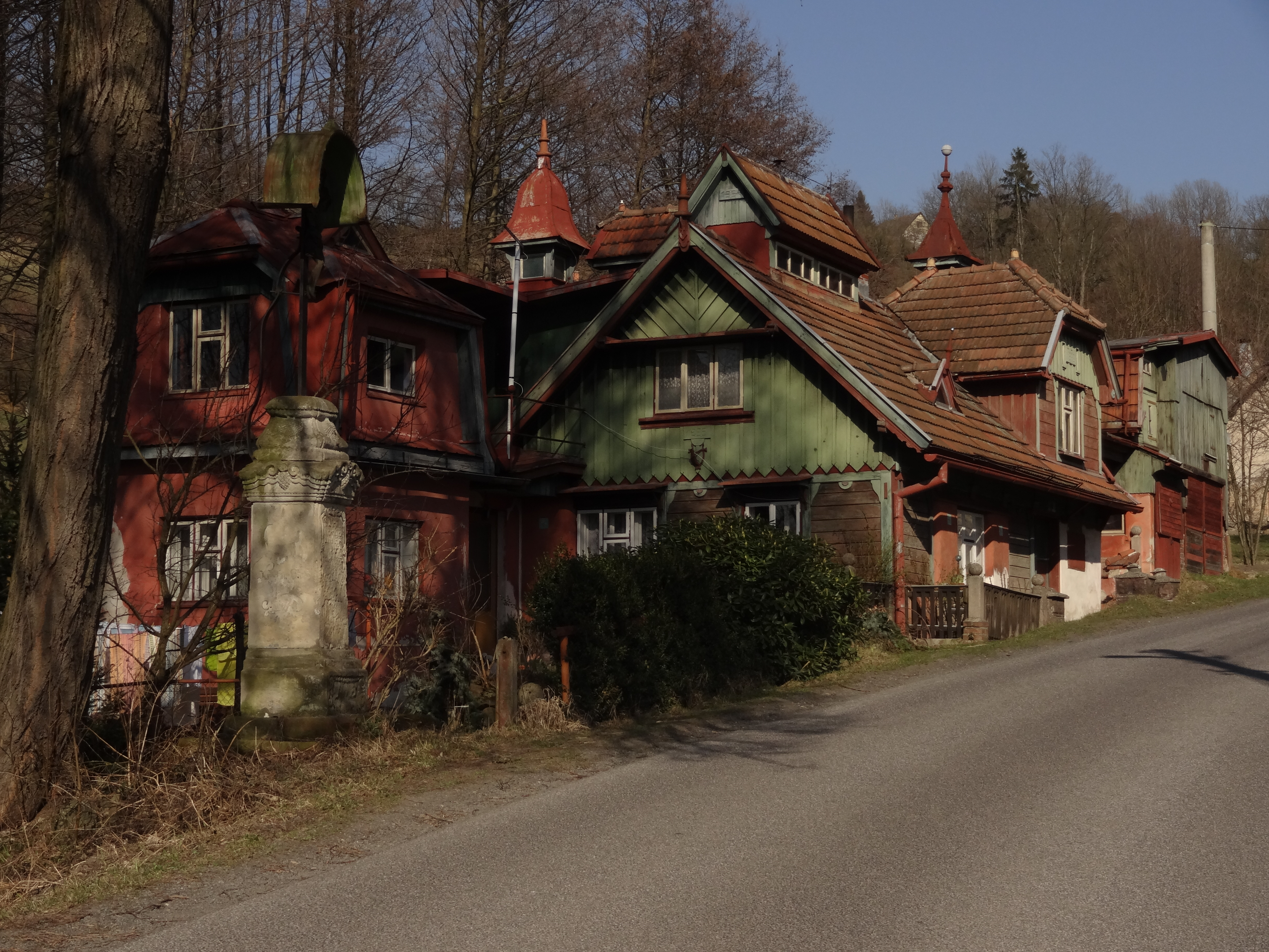 Proseč pod Ještědem - Škodův dům čp. 129